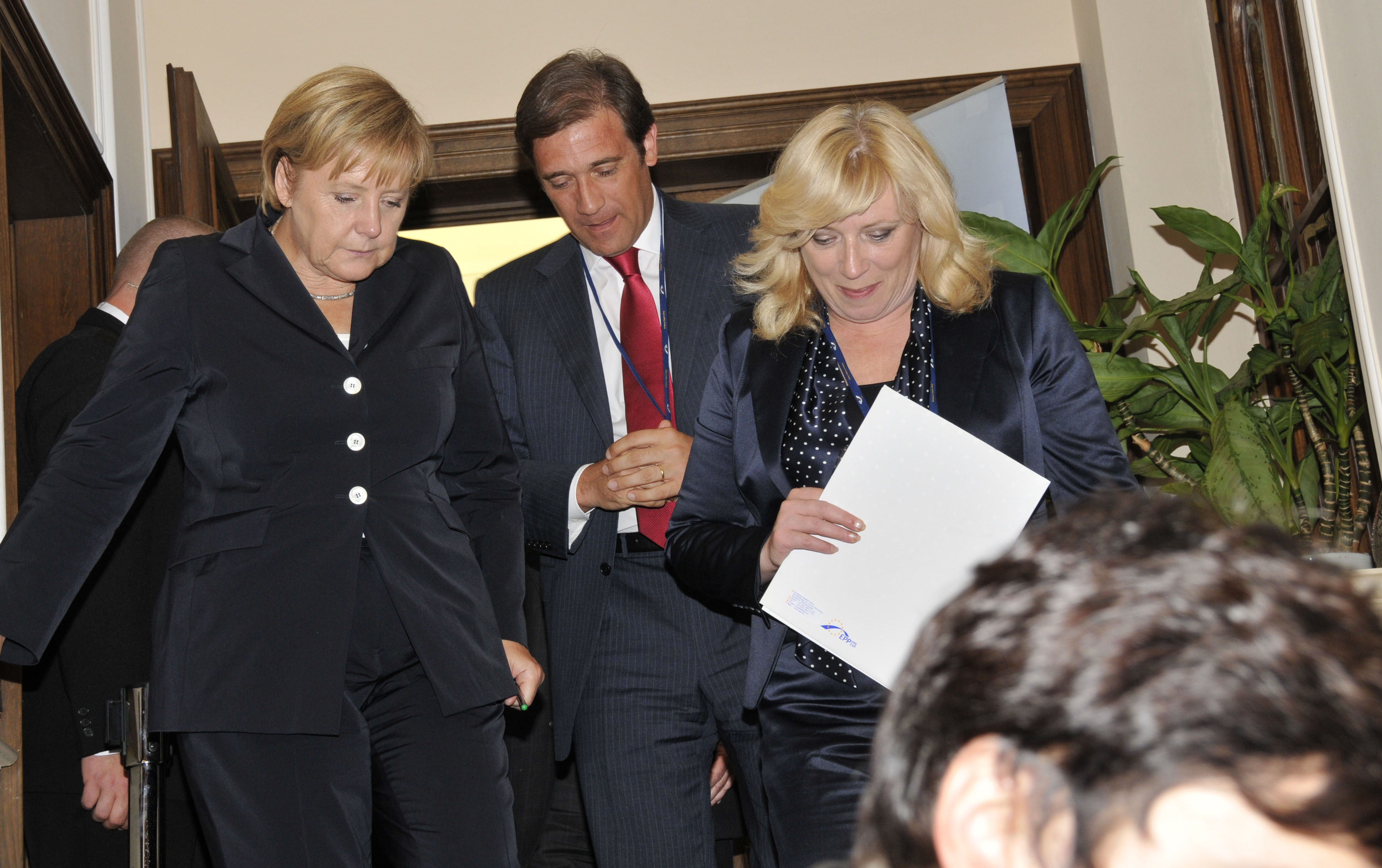 EPP Summit September 2010